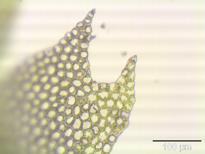 Zweizähniges Kammkelchmoos (Lophocolea bidentata), Flankenblatt, etwa 400x vergrößert